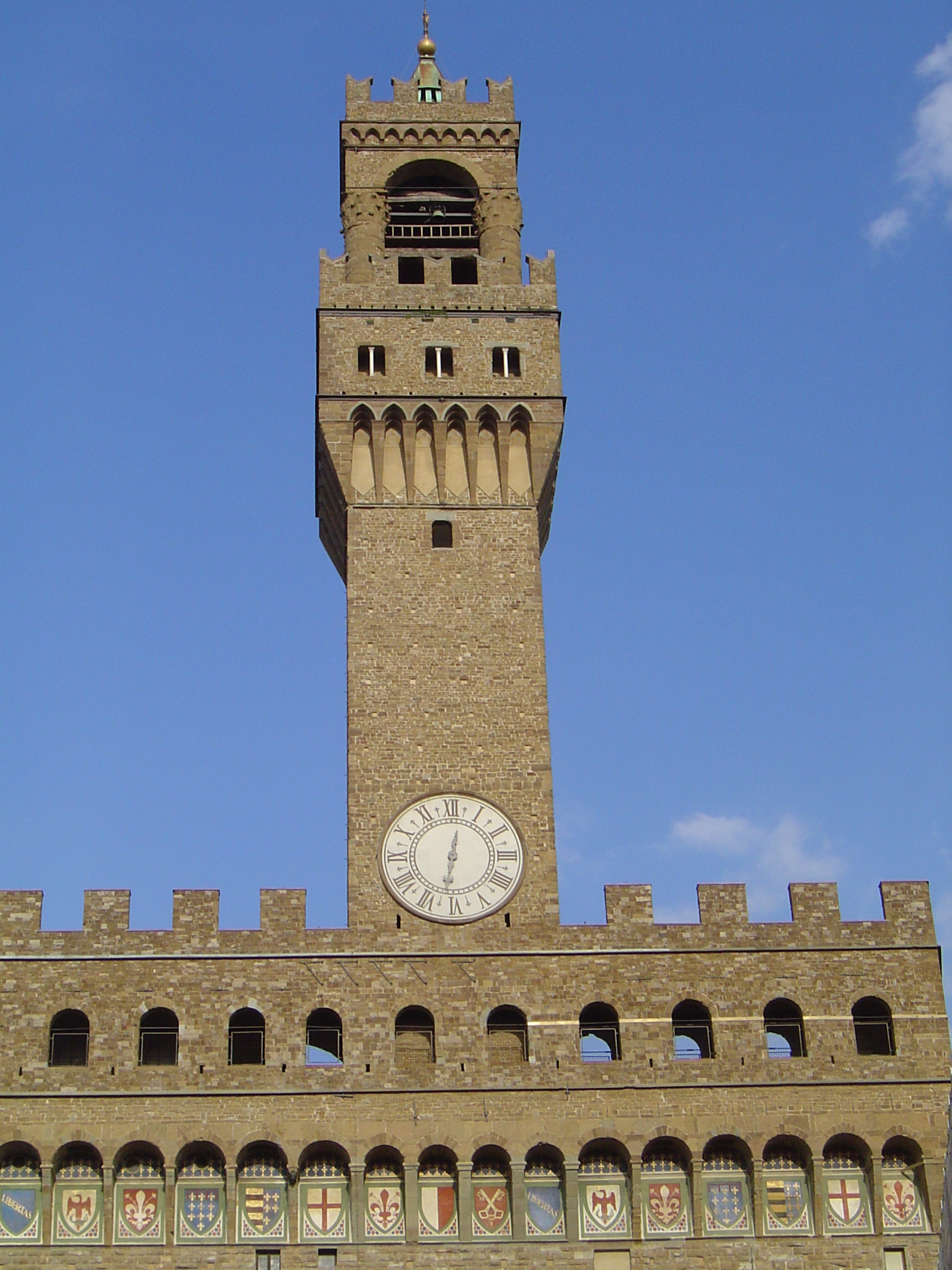 Palazzo Vecchio, Florence, Italy